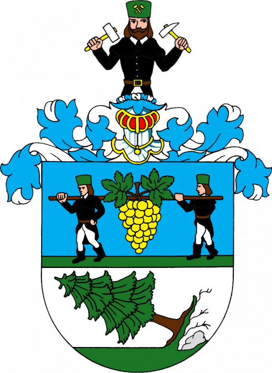 Znak obce Vejprty